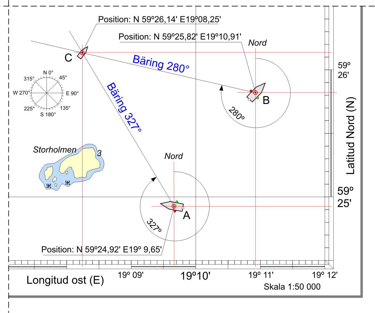 Bestämning av bäringen till ett föremål C från två positioner A och B ger positionen för föremålet C.